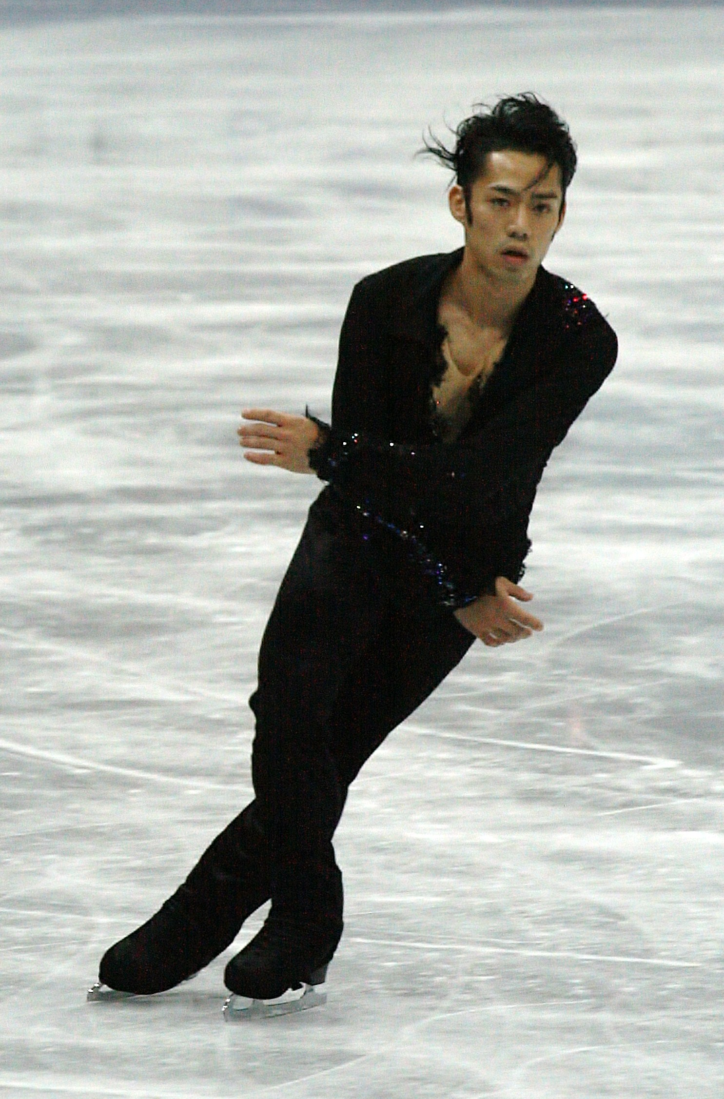 Дайсуке Такахаси (Япония) на финале Гран-при 2012-2013. Произвольная программа.